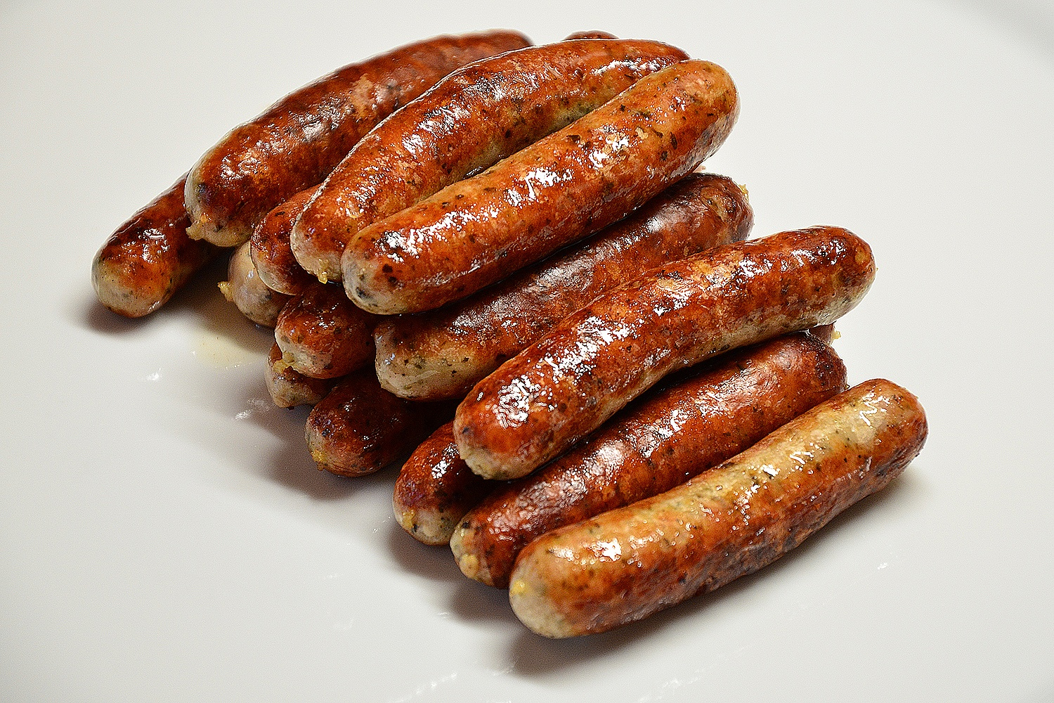 Rostbratwurst, servierfertig, Datum/Uhrzeit: 07.06.2012 20:01:58